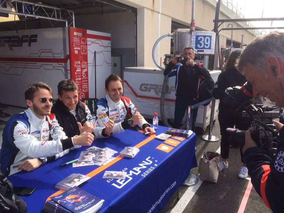 ELMS LMP2, Graff n°39, Le Castellet, avril 2019. #39 GRAFF (FRA) ORECA 07 GIBSON LMP2 TRISTAN GOMMENDY (FRA) ALEXANDRE COUGNAUD (FRA) JONATHAN HIRSCHI (CHE)